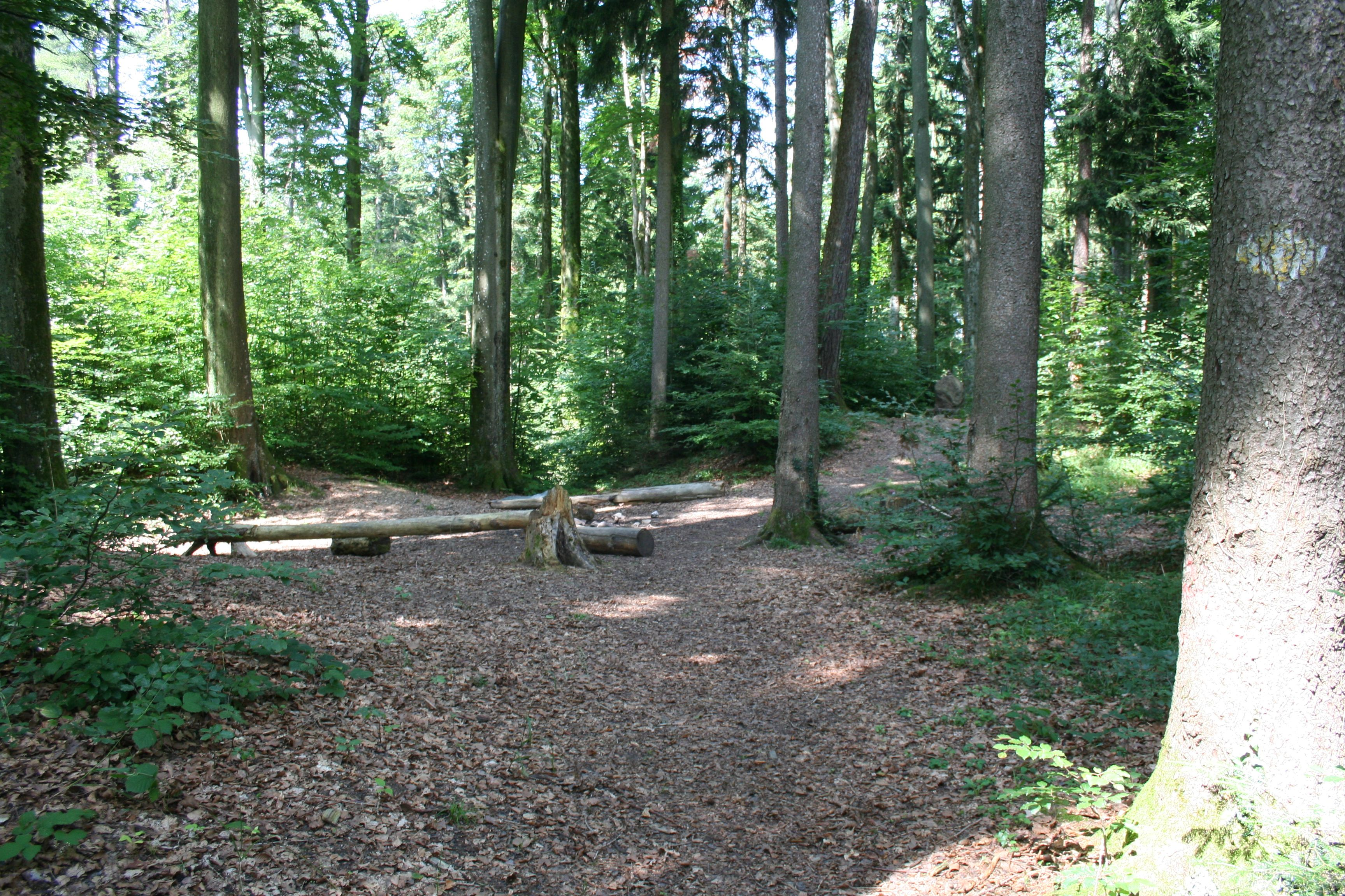 Keltengräber im Zollikerberg